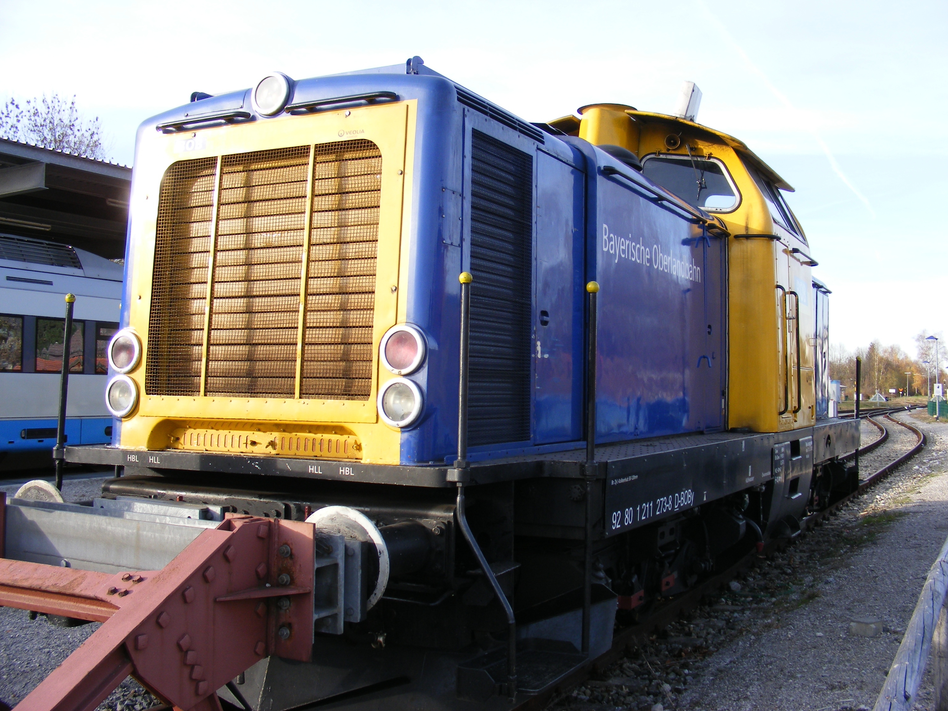 Rangierlokomotive der Bayerischen Oberlandbahn im Bahnbetriebswerk Lenggries (DB-Baureihe V 100, Nr. 82 80 1 211 273-8 D-BOBy)